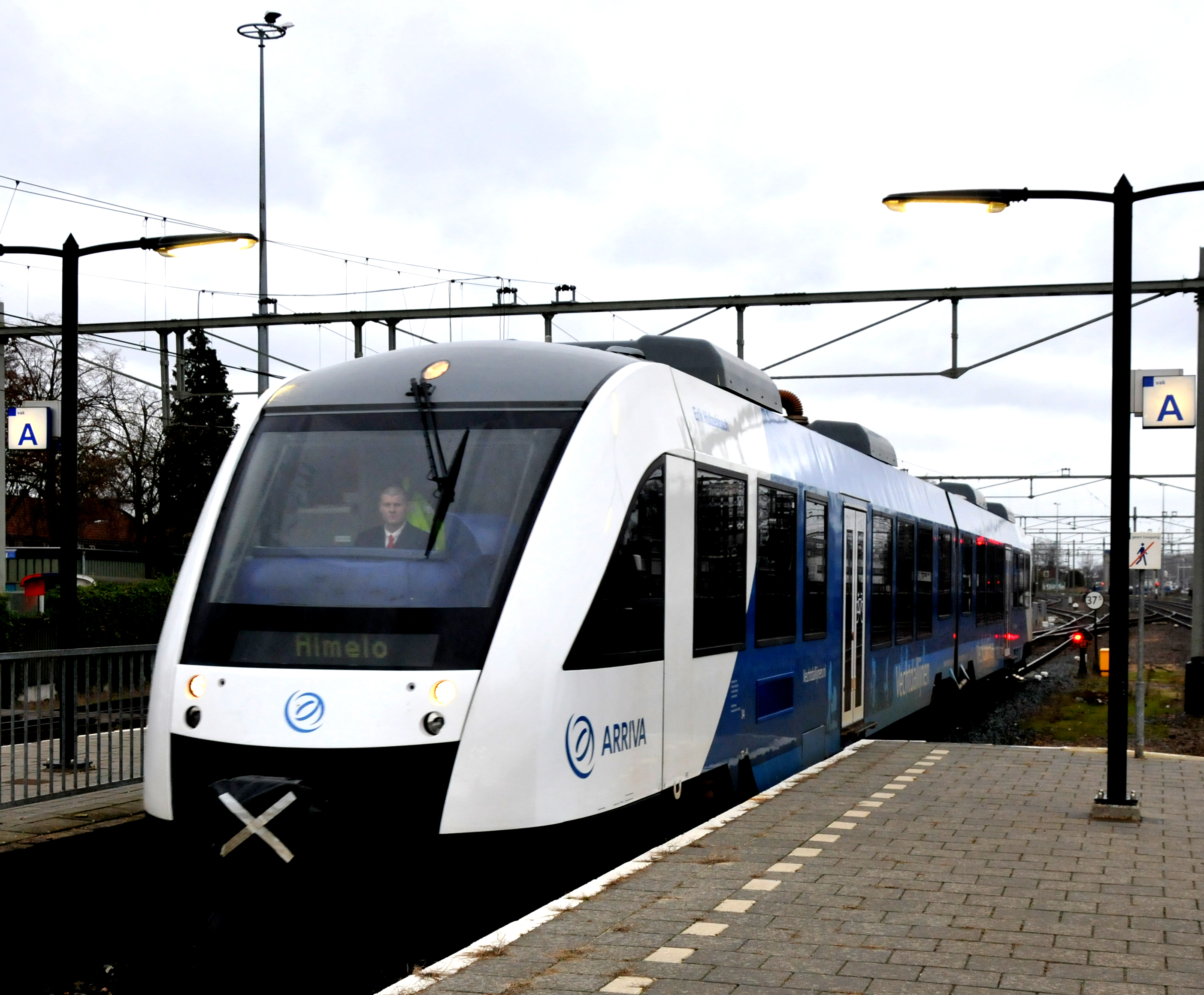 Arriva treinstel 10034, ex Syntus 34 van het type Alstom Coradia LINT te station Almelo. Dit treinstel kreeg bij Arriva de naam Erik Hulzebosch.